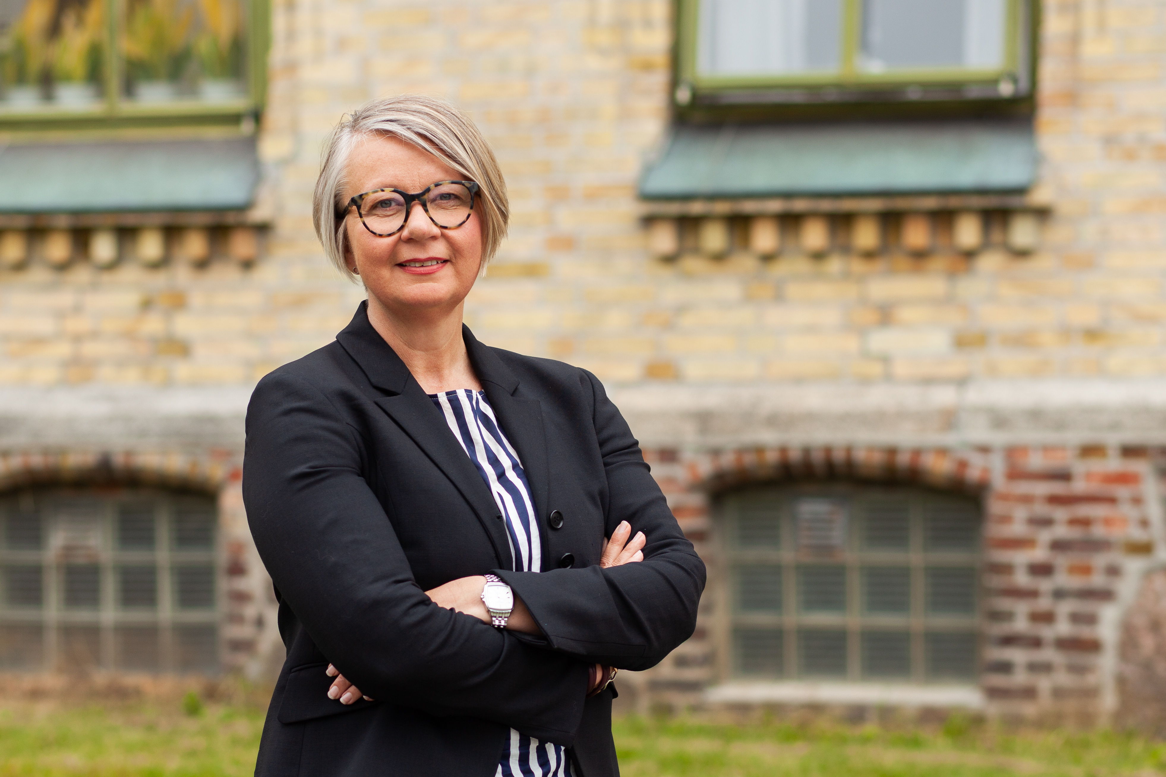 Nina Mevold, administrerende direktør Sørlandet Sykehus HF.